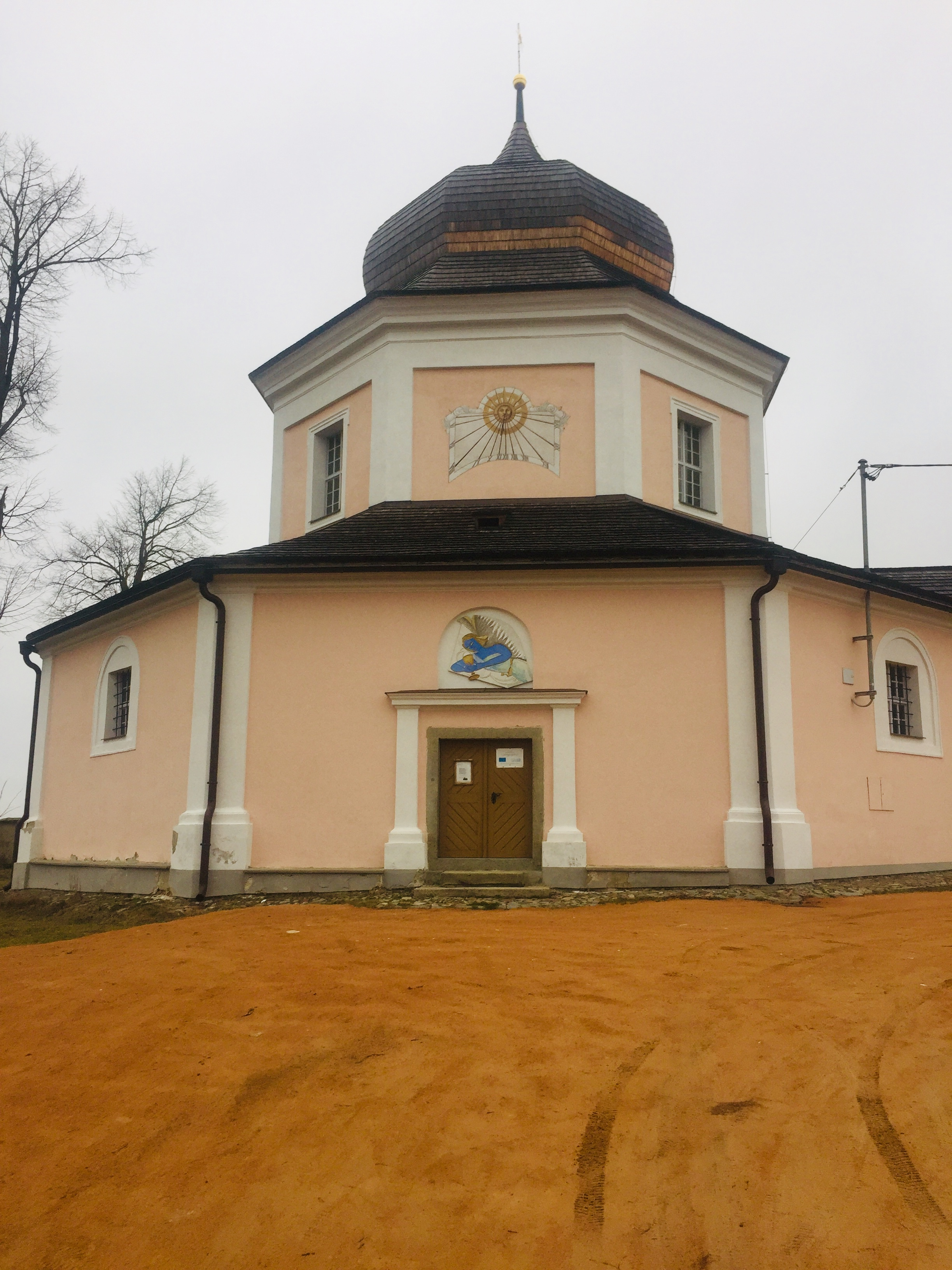 Pročevily, část obce Volenice, okres Příbram, Česko. Kostel